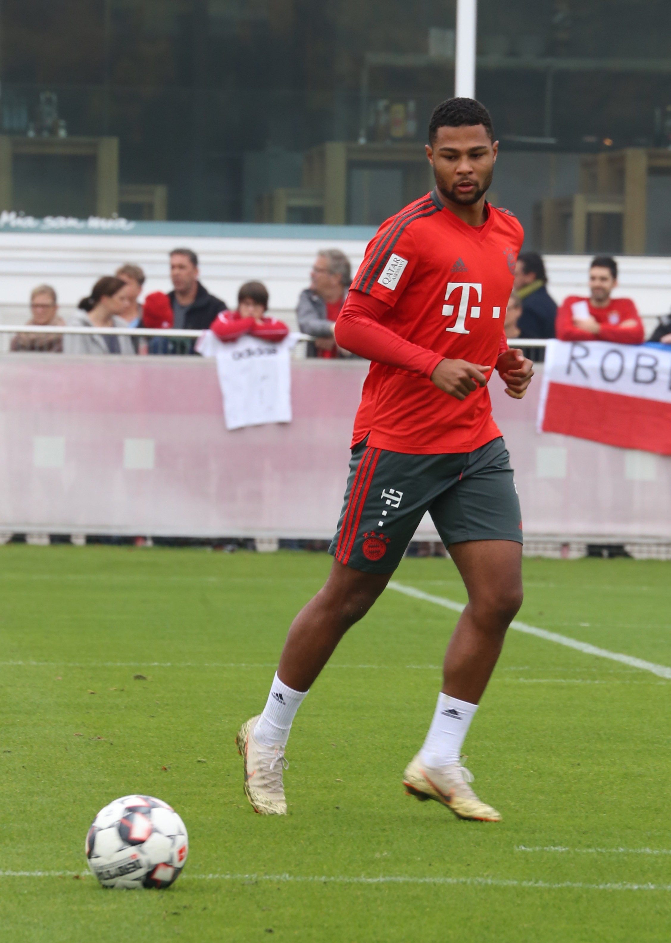 Serge Gnabry, am 9. Oktober 2018 beim Training auf dem Gelände des FC Bayern München